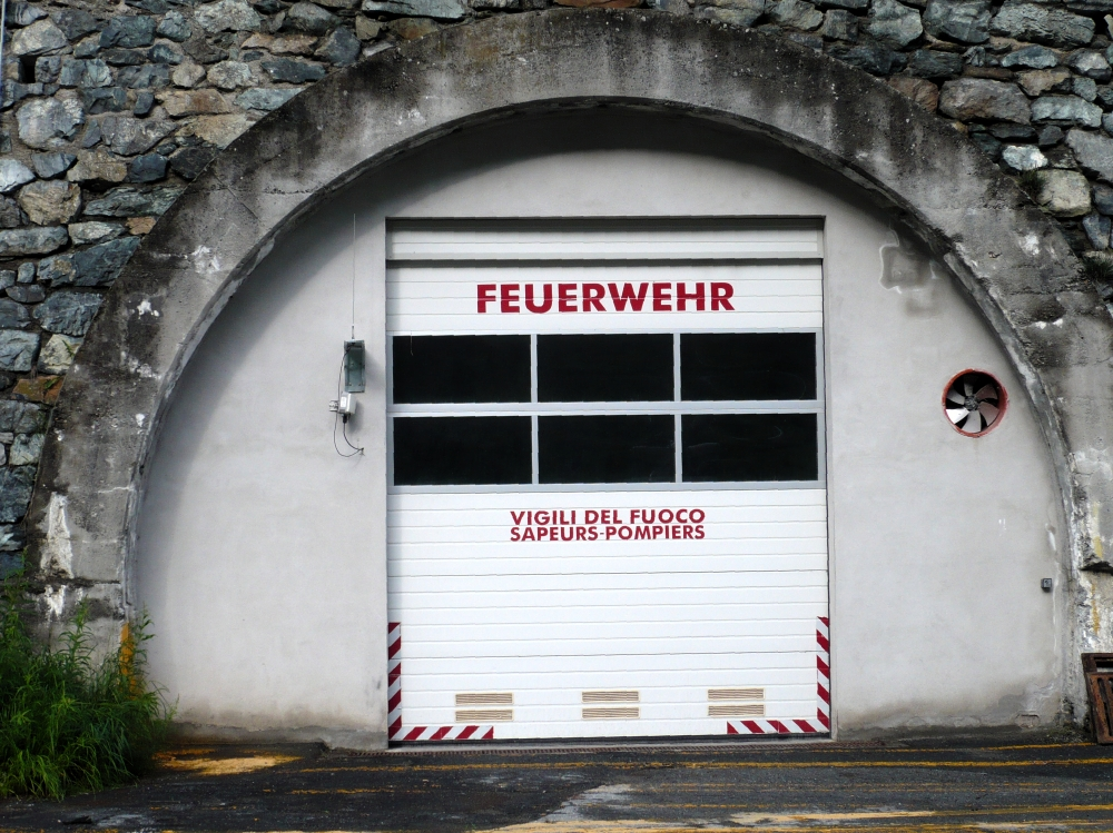 offizielle dreisprachige Beschriftung (deutsch / italienisch / französisch) im Walserdorf Gressoney-La-Trinité